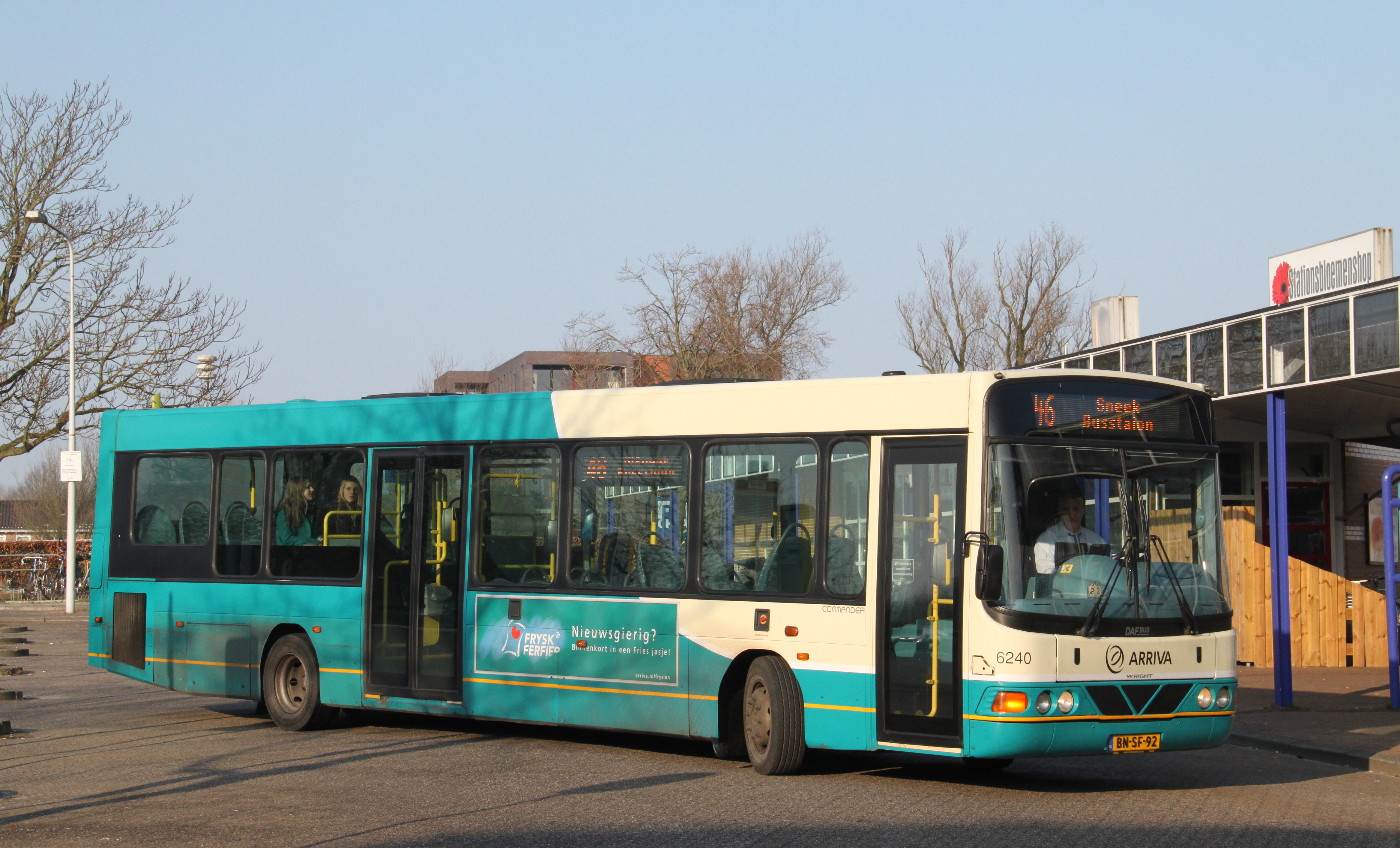 Een Wright Commander bij vertrek bij het station van Sneek. Deze wagens reden vanaf het begin van de concessie in Friesland enige tijd rond voordat alle nieuwe bussen afgeleverd werden.